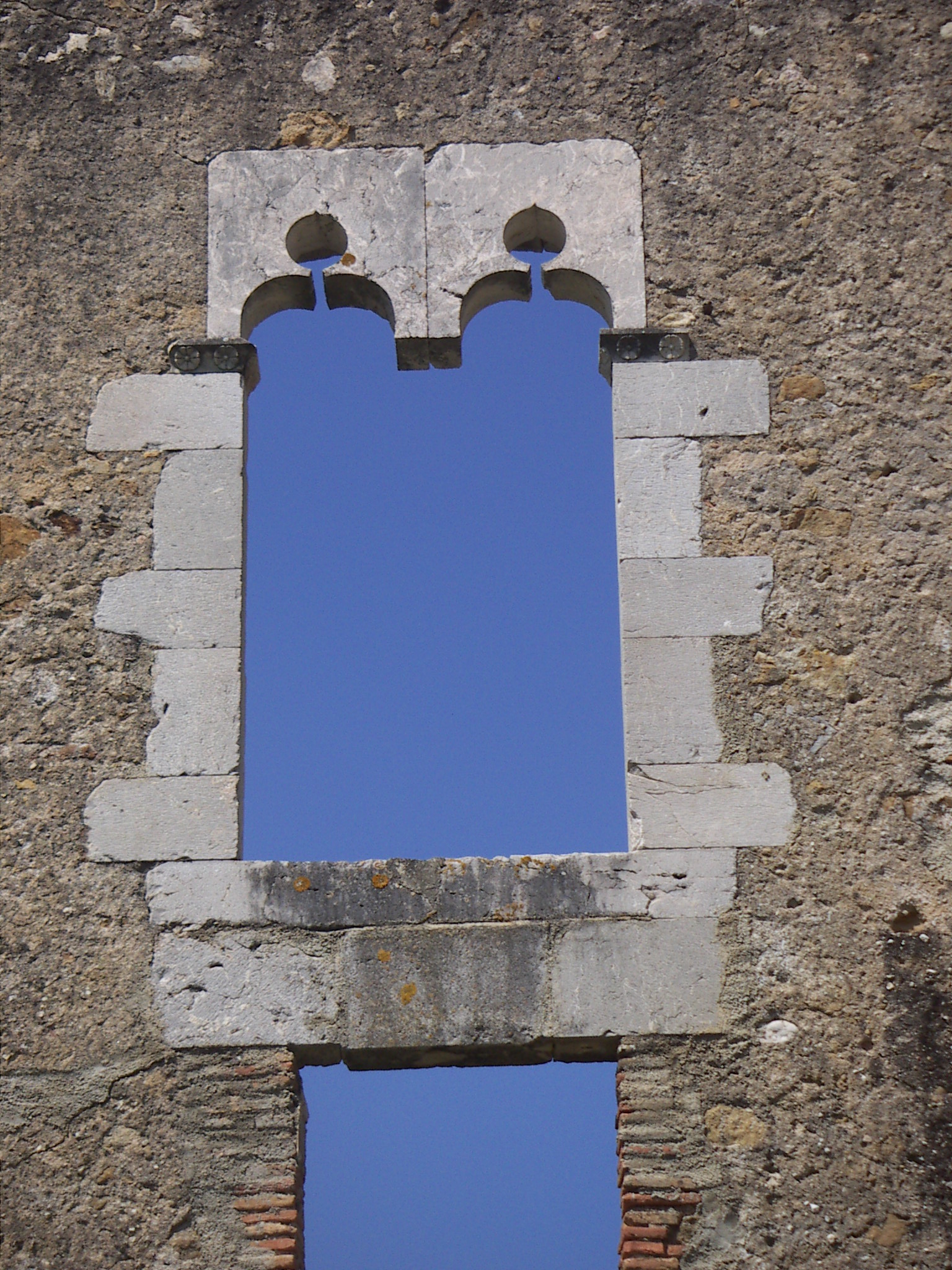 Detall de santa Maria del Roure a Pont de Molins